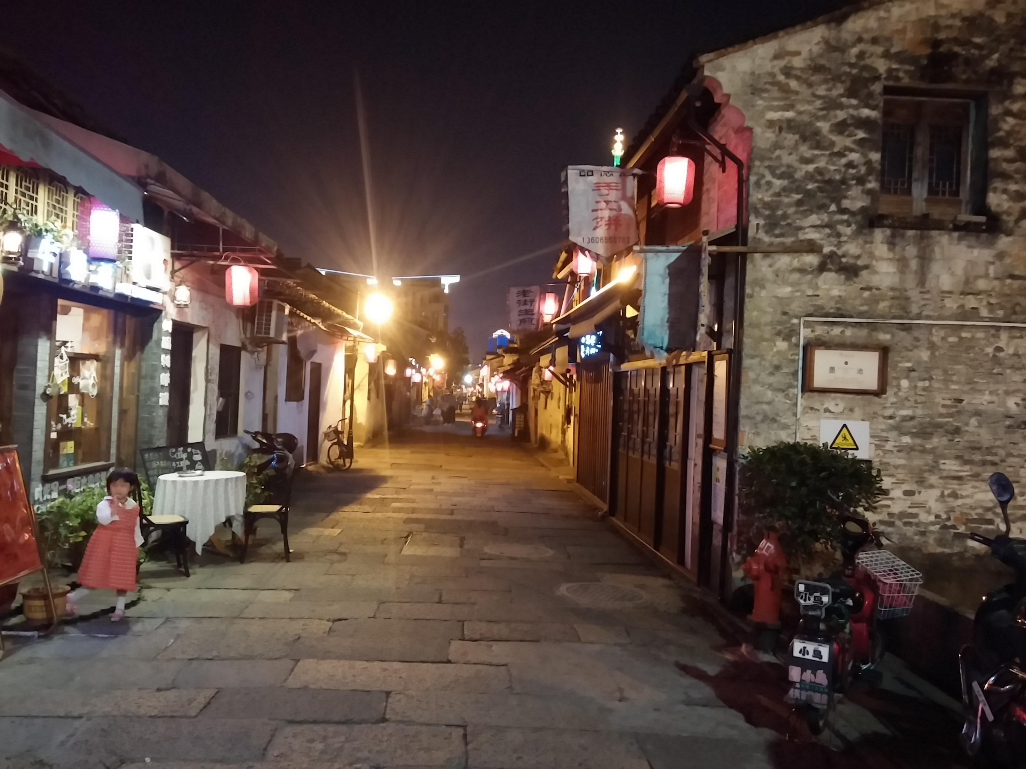 Yuecheng, Shaoxing, Zhejiang, China